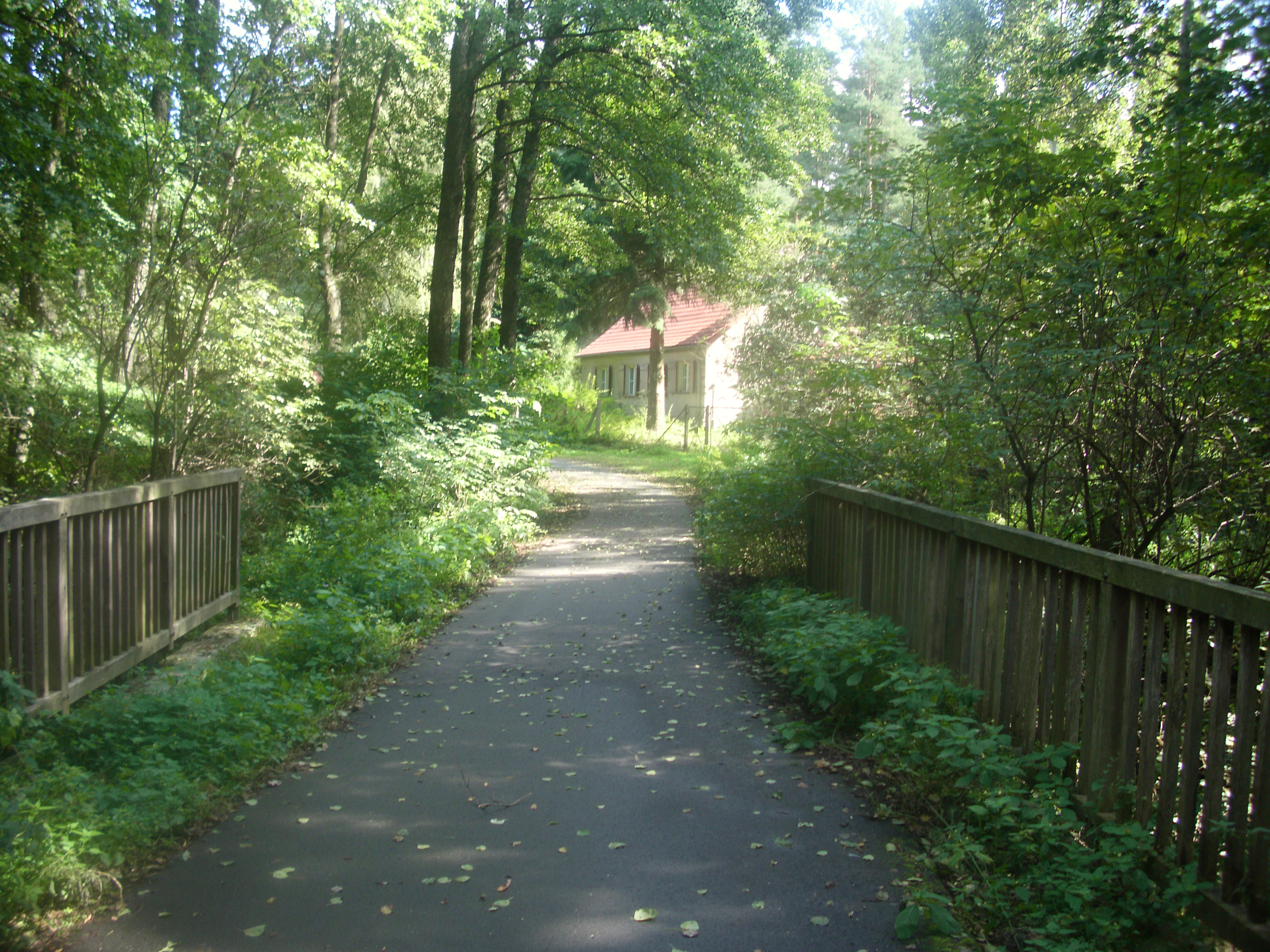 Brücke über die Oelse an der ehemaligen Walkemühle, Naturpark Schlaubetal, Brandenburg